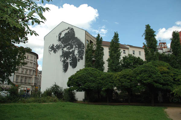 En 2007, Ash a participé à l'exposition Backjumps à Berlin ou il a réalisé la fresque « Astronaut Cosmonaut » ; cette œuvre est située dans le quartier de Kreuzberg sur une façade d'immeuble très visible depuis la ligne de métro U1 station Kotbusser Tor.